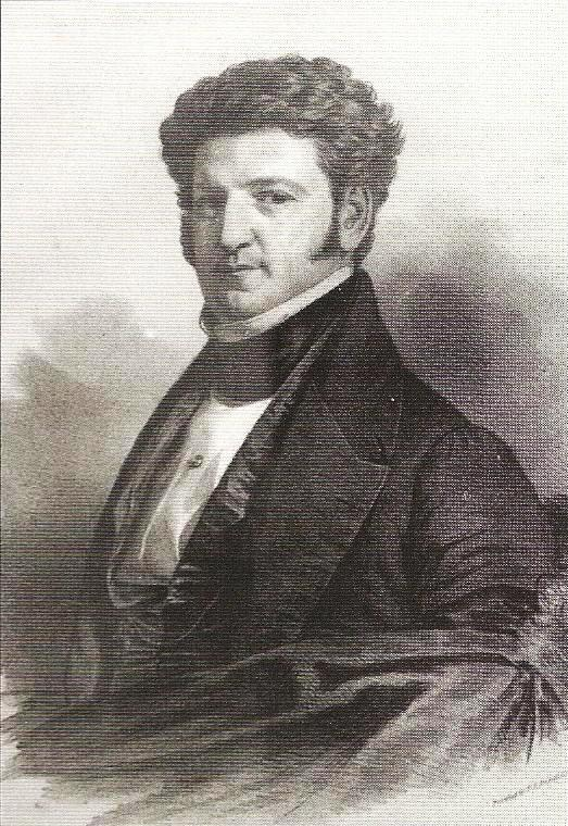 Portrait du gouverneur de la Louisiane Alexandre Mouton (jeune)